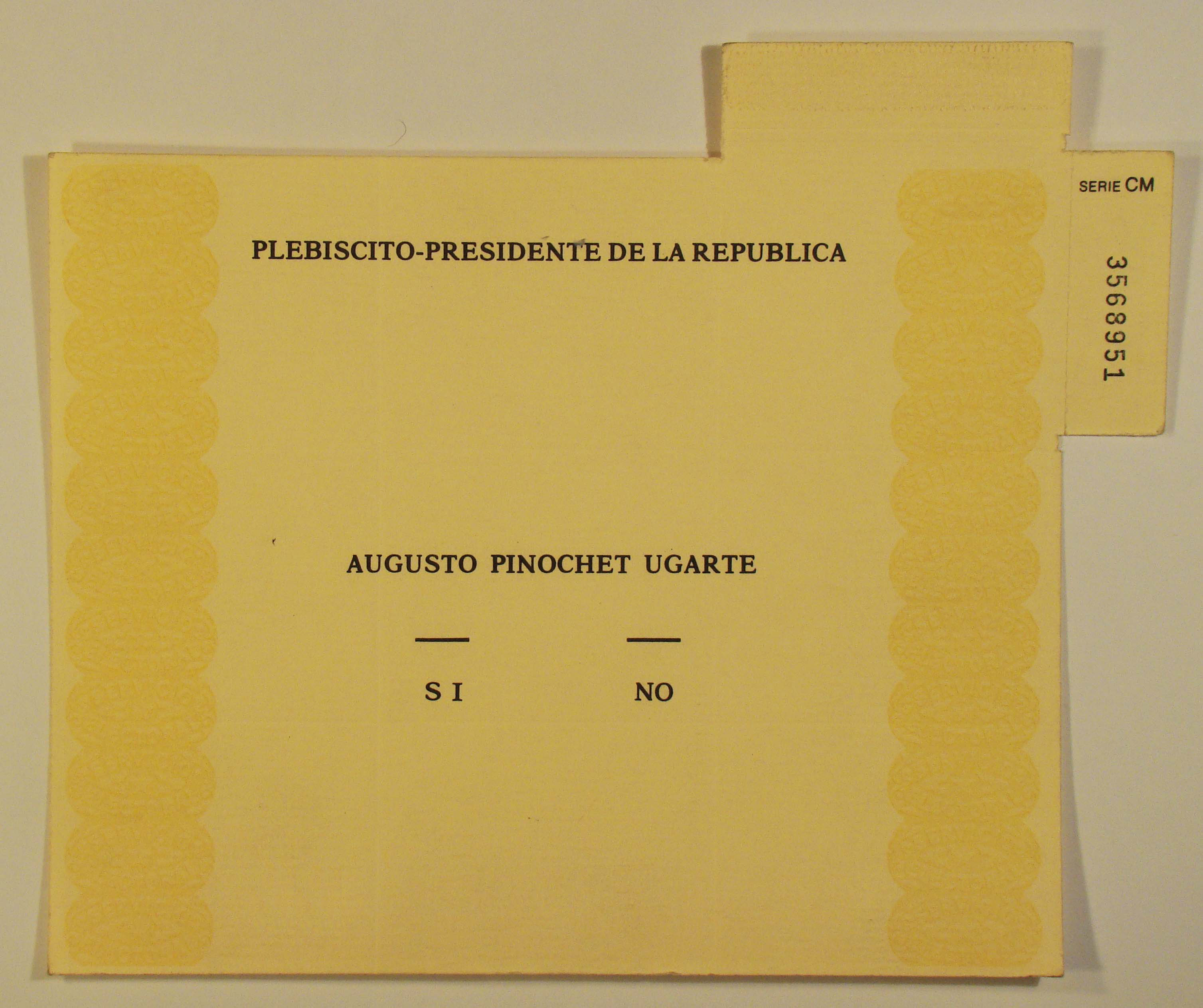 Documento de la época del Regimen militar de Augusto Pinochet en Chile